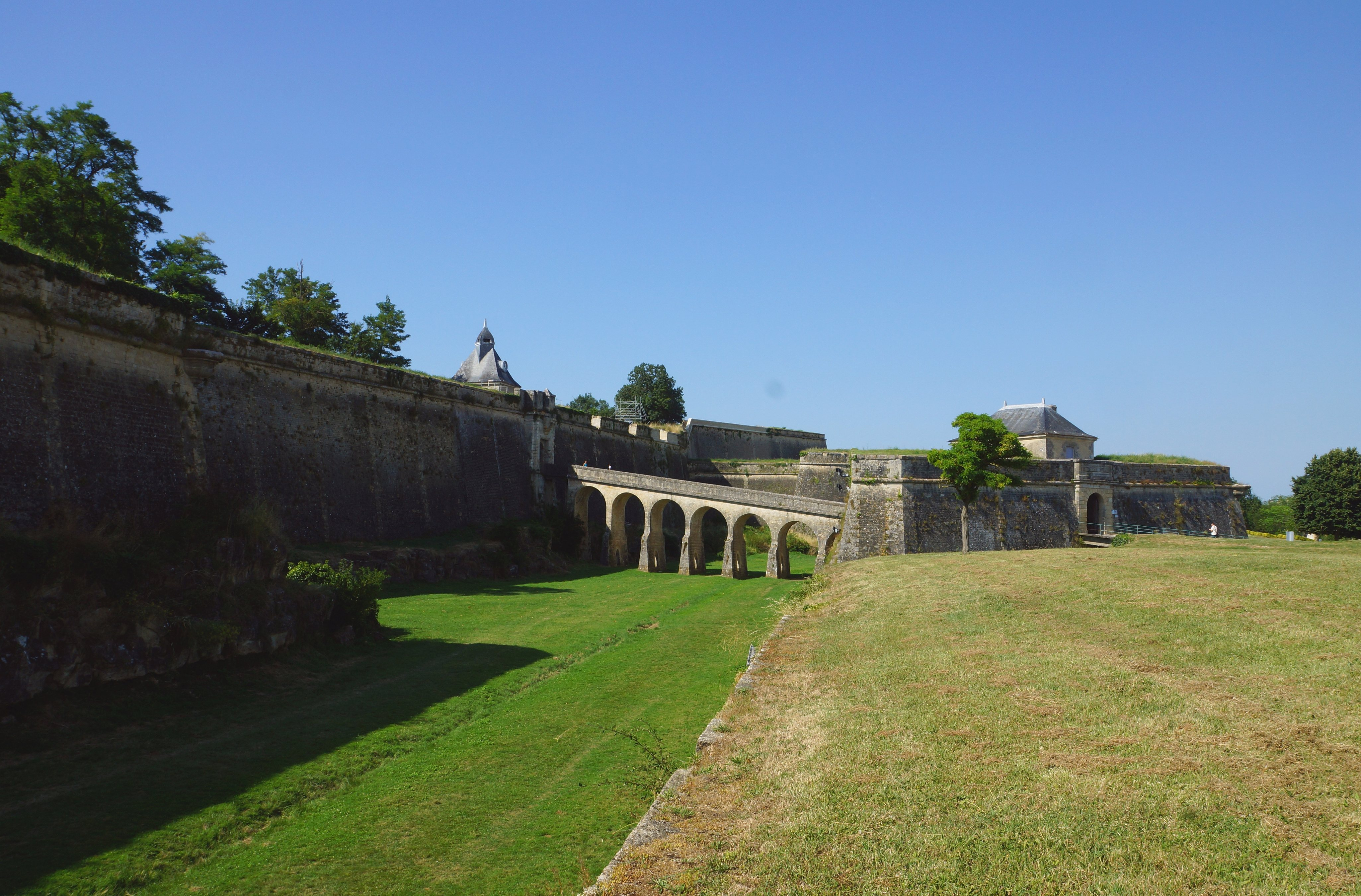 Die Zitadelle von Blaye im Ausbau aus der Zeit 1680-1689 im Blick von Südwesten - Citadelle de Blaye unter Aufsicht von Vauban an der Gironde in Frankreich entstanden. Foto Wolfgang Pehlemann. CC BY-SA-3.0-de